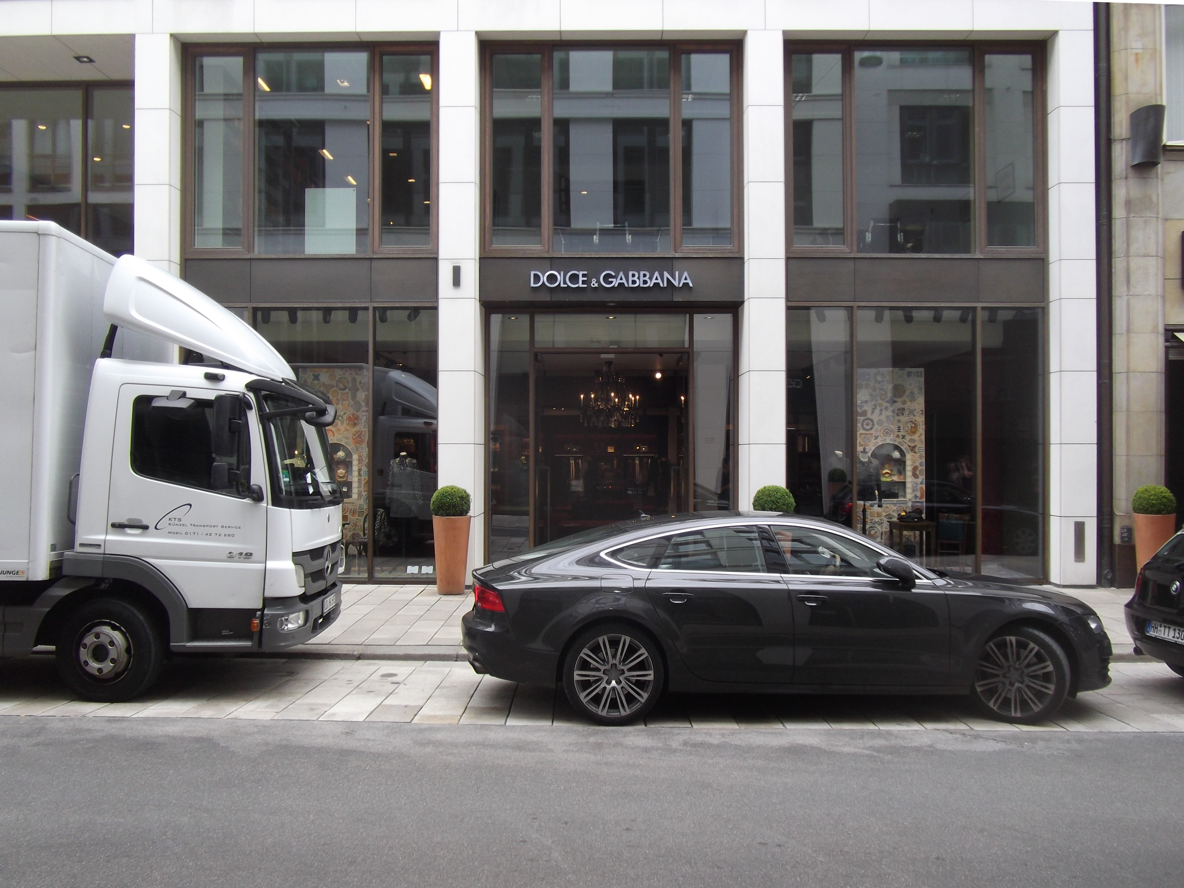 Hamburg, Neuer Wall